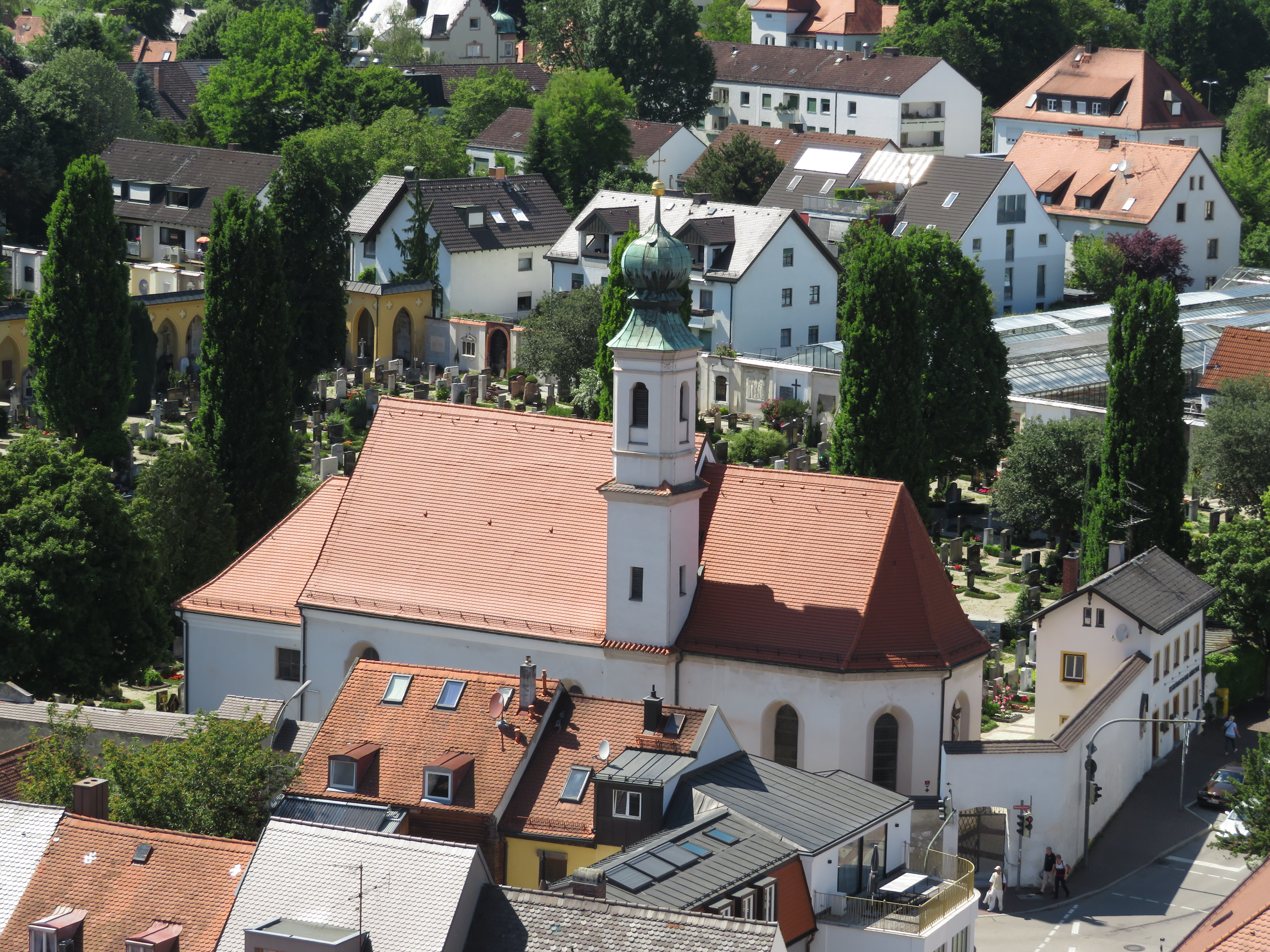 Innenraum der Gottesackerkirche St. Maria in Freising